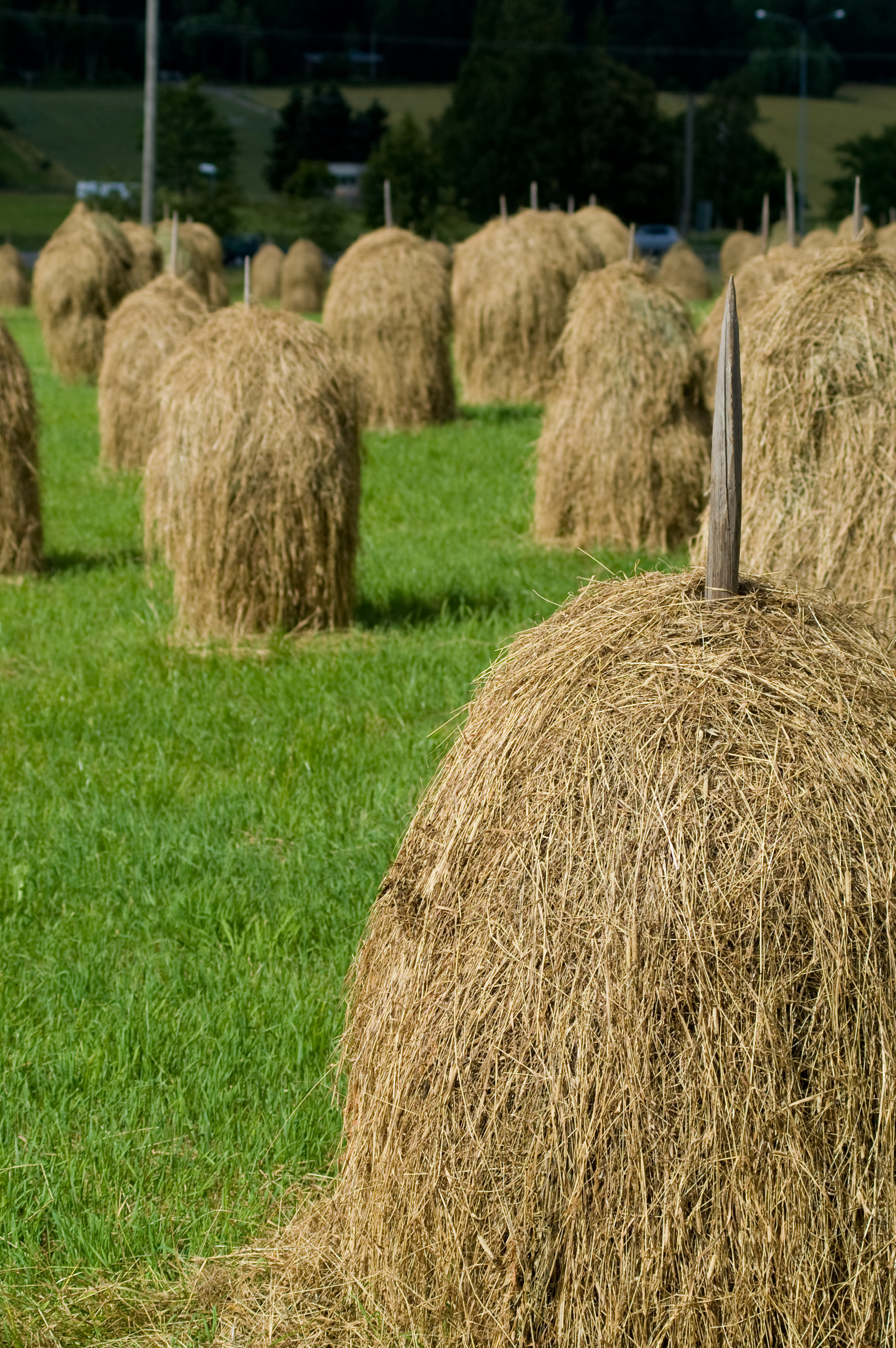 lähiretki-25150